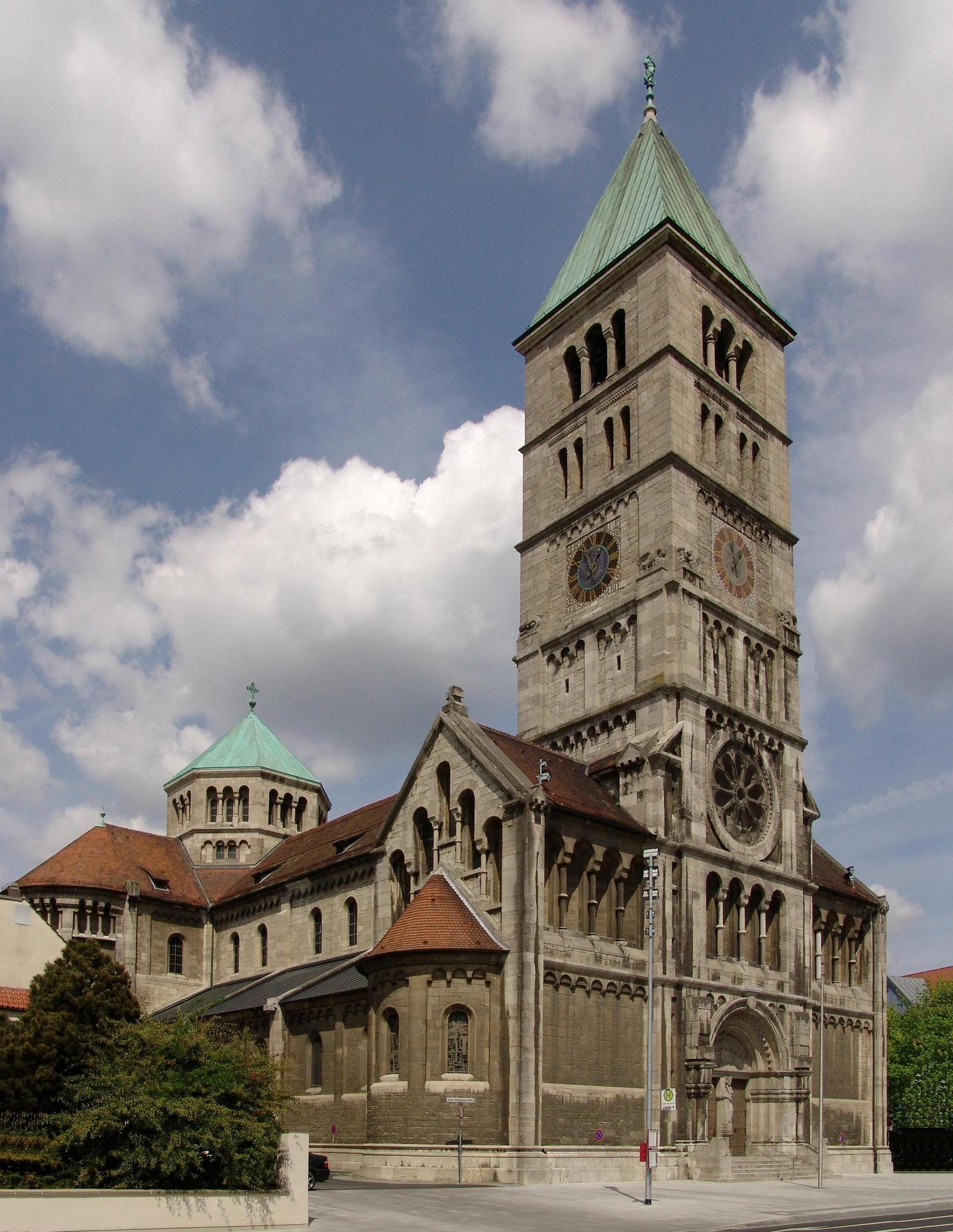 Schweinfurt, katholische Pfarrkirche Heilig Geist